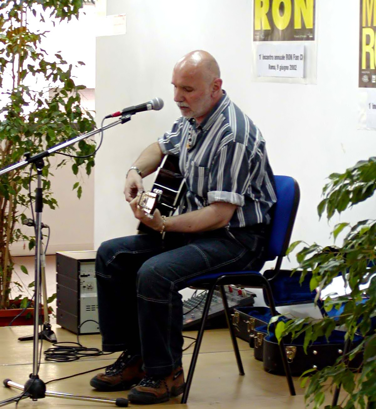 Renzo Zenobi in concerto; foto fornitami da Helga del Ron fan club per l'uso in Wikipedia